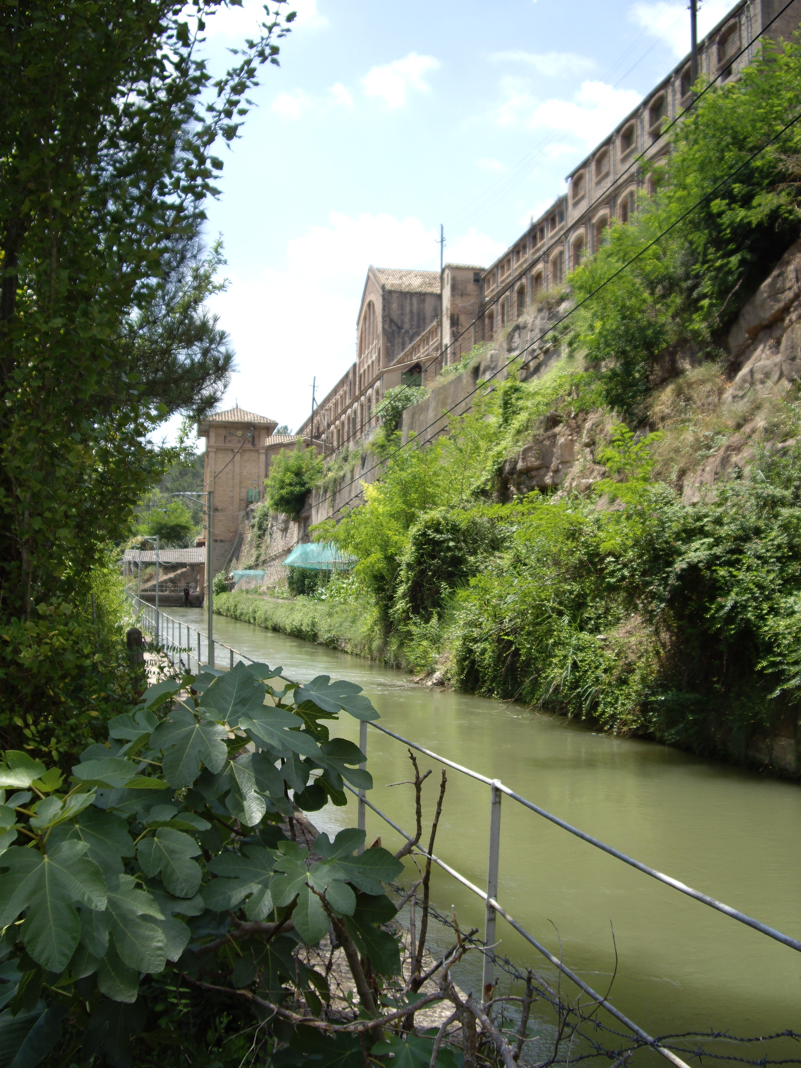 Colònia Vidal, Puig-reig. Com Catalunya és un país deficitari de carbó, va ser necessari cercar alternatives: l'aigua. Prop del Llobregat s'ubica aquesta colònia industrial per aprofitar la força de l'aigua.